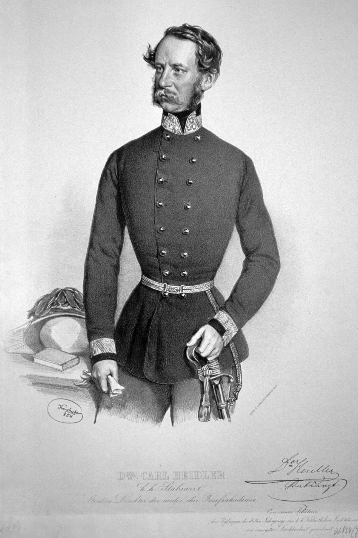 Karl von Heidler (1809-1887), Ritter von Egeregg, k. k. Generalstabsarzt, Direktor der Josefs-Akademie.